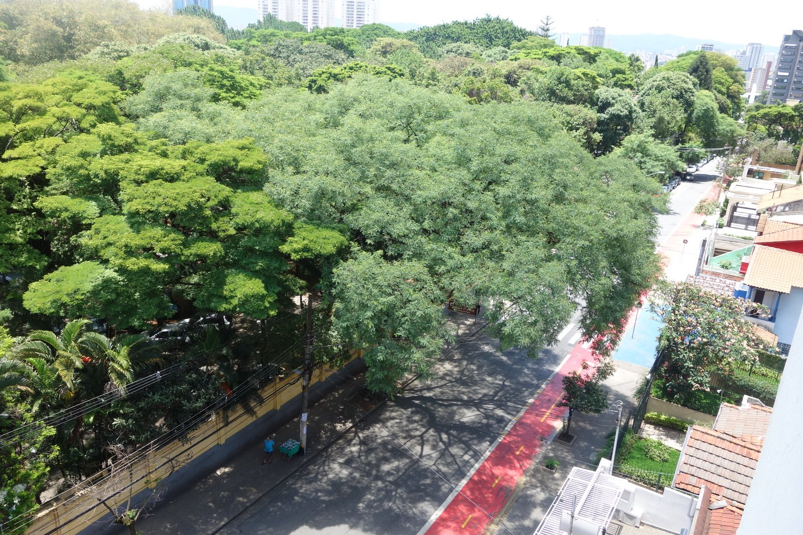 Foto da rua Ministro godoy